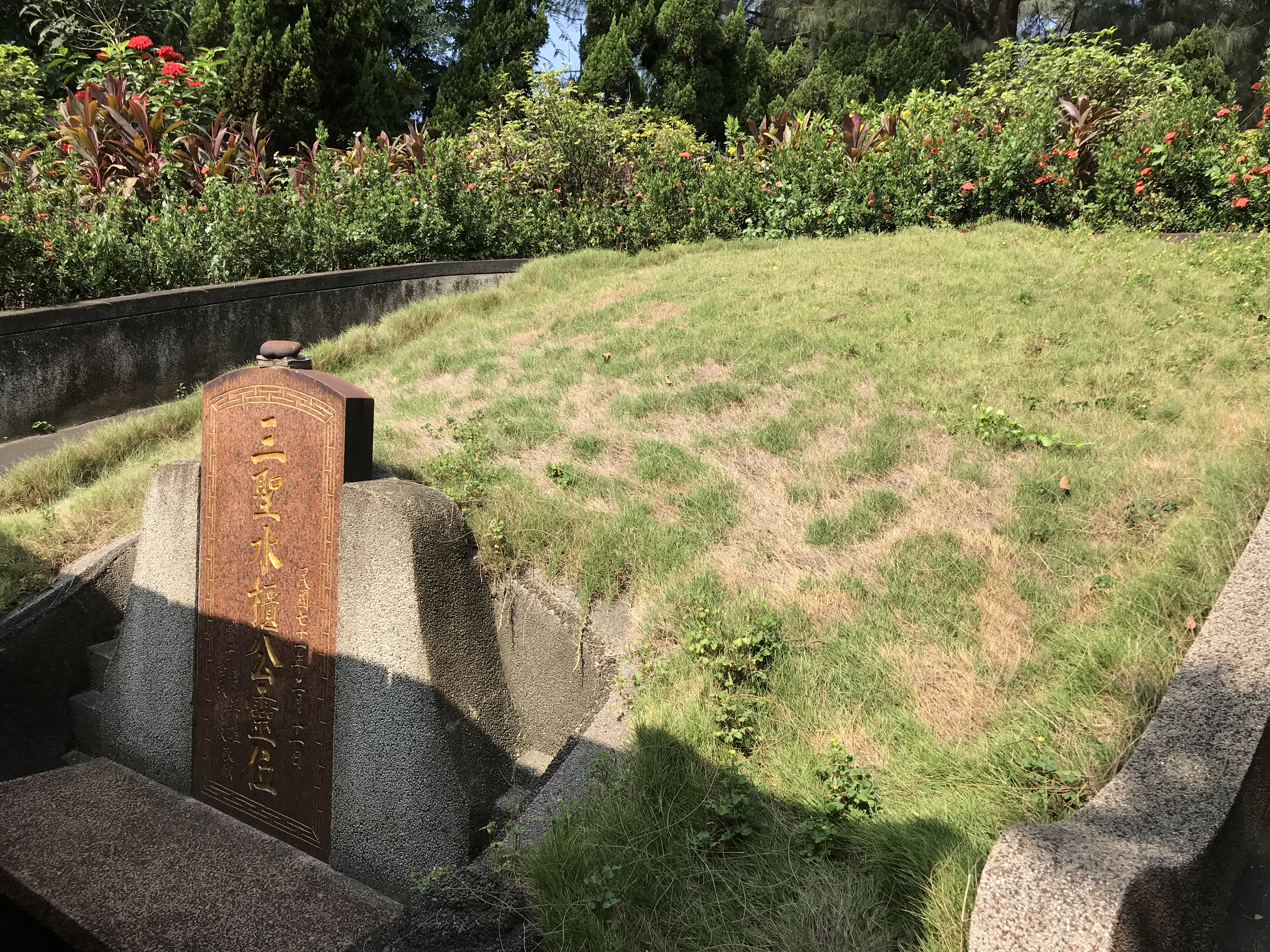 三聖水櫃公廟墓